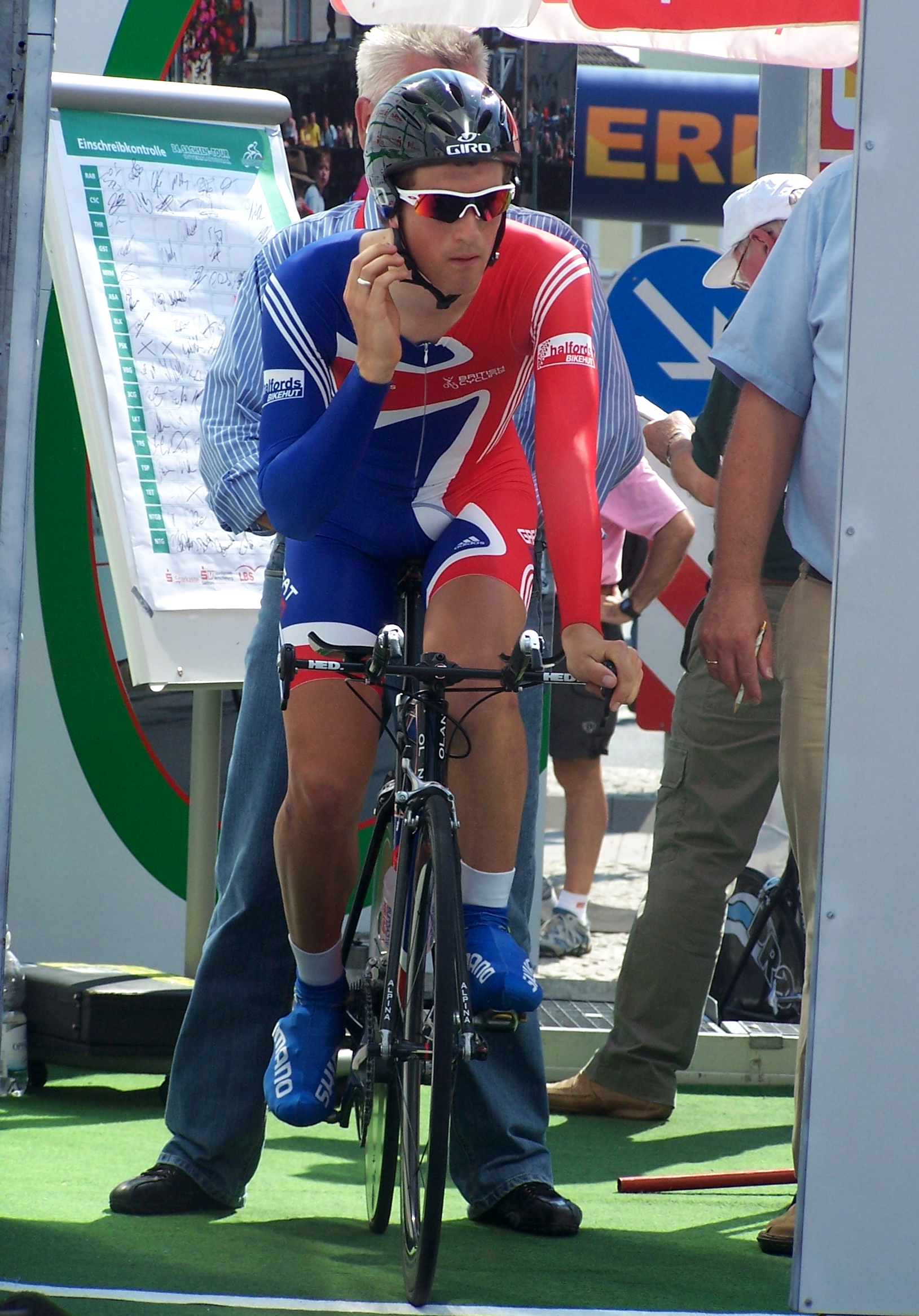 Die Aufnahme entstand beim Einzelzeitfahren der Sachsen-Tour 2008 in Großenhain